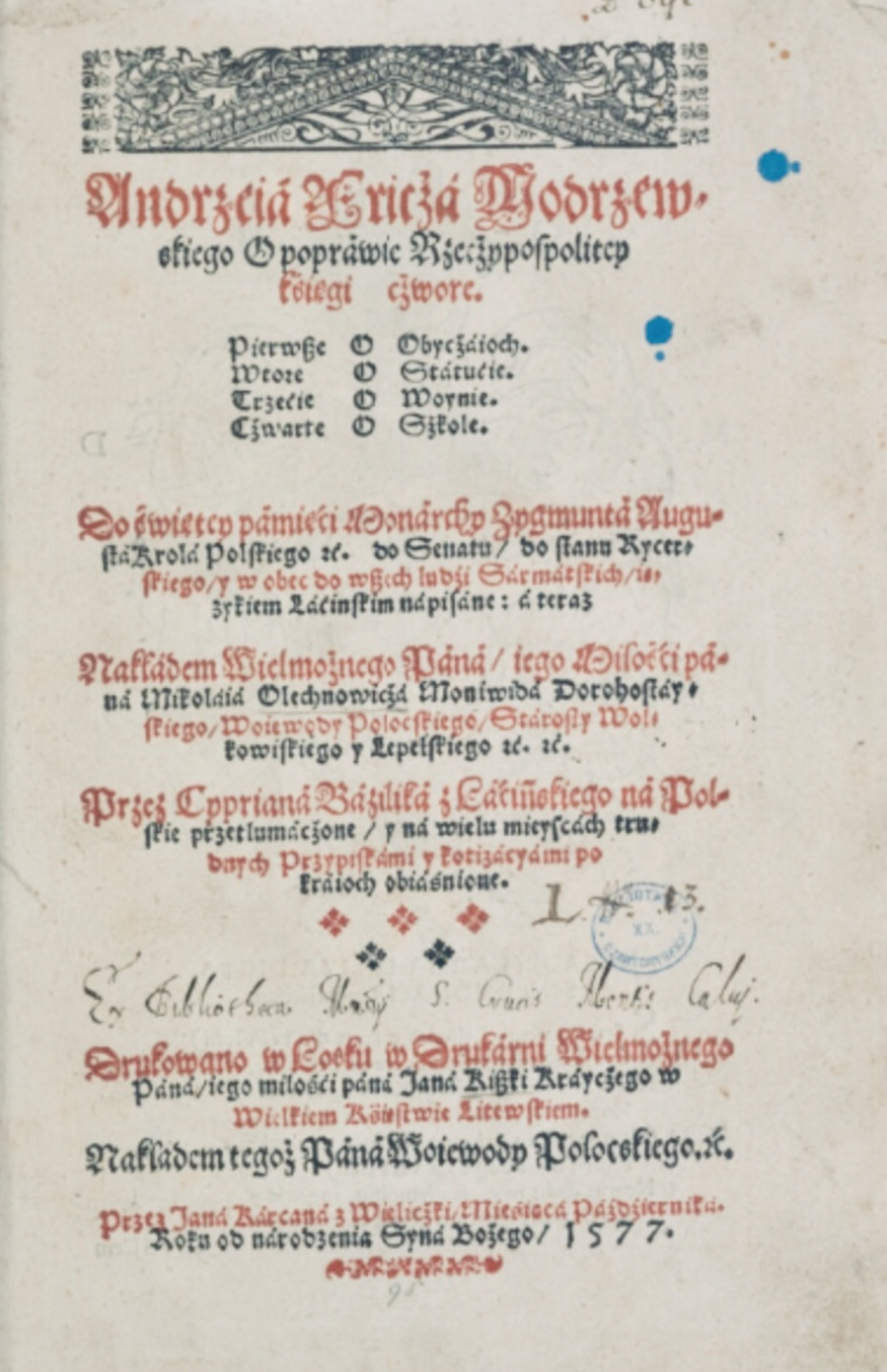 A.Frycza Modrzewskiego De Republica Emendanda 1577 - egzemplarz Biblioteki Książąt Czartoryskich - Muzeum Narodowe w Krakowie